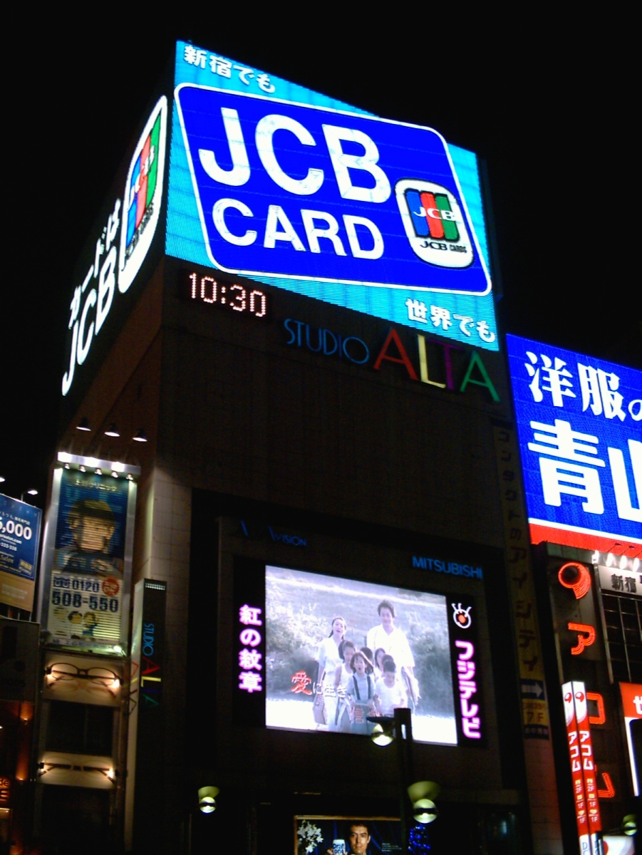 Studio alta Shinjuku, Tokyo